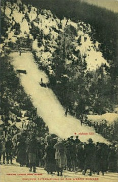 Concours de ski en 1908 aux Eaux-Bonnes en présence d'Alphonse XIII - France